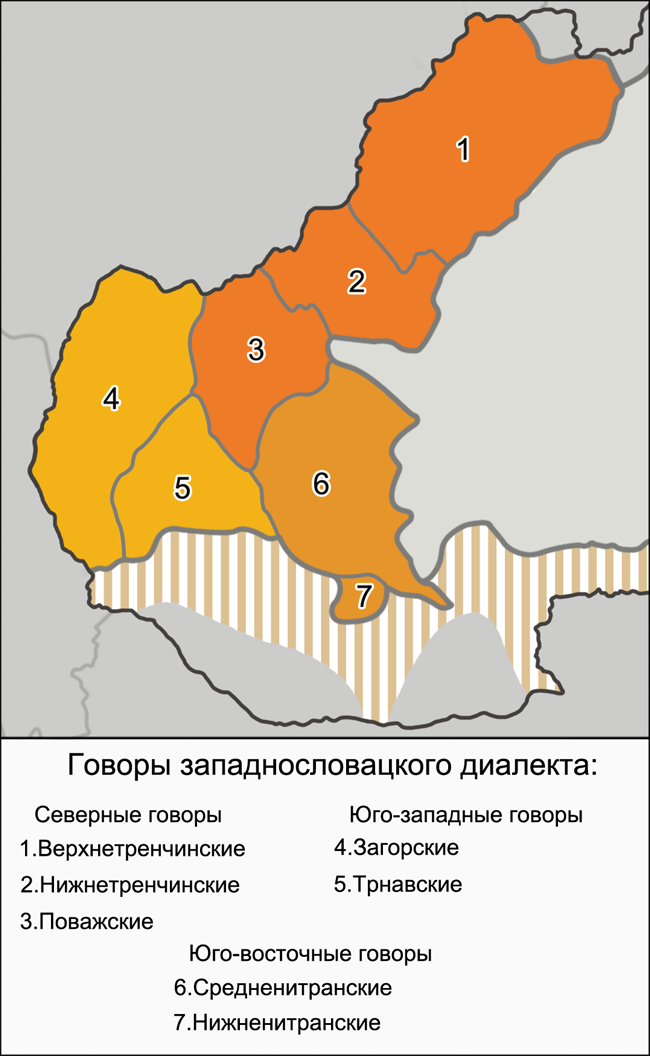 Классификация говоров западнословацкого диалекта согласно диалектологической карте в «Атласе словацкого языка» (Atlas slovenského jazyka), опубликованной под редакцией Й. Штольца (J. Štolc). Источники: Map of Slovak Dialects Slovake.eu. Úvod. O jazyku. Nárečia Short D. Slovak // The Slavonic Languages / Edited by Comrie B., Corbett G. — London, New York: Routledge, 1993. — p. 590. — ISBN 0-415-04755-2 Лифанов К. В. Диалектология словацкого языка: Учебное пособие. — М.: Инфра-М, 2012. — Карта 1. Диалекты словацкого языка. — ISBN 978-5-16-005518-3